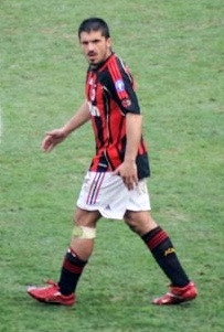 Gennaro Gattuso